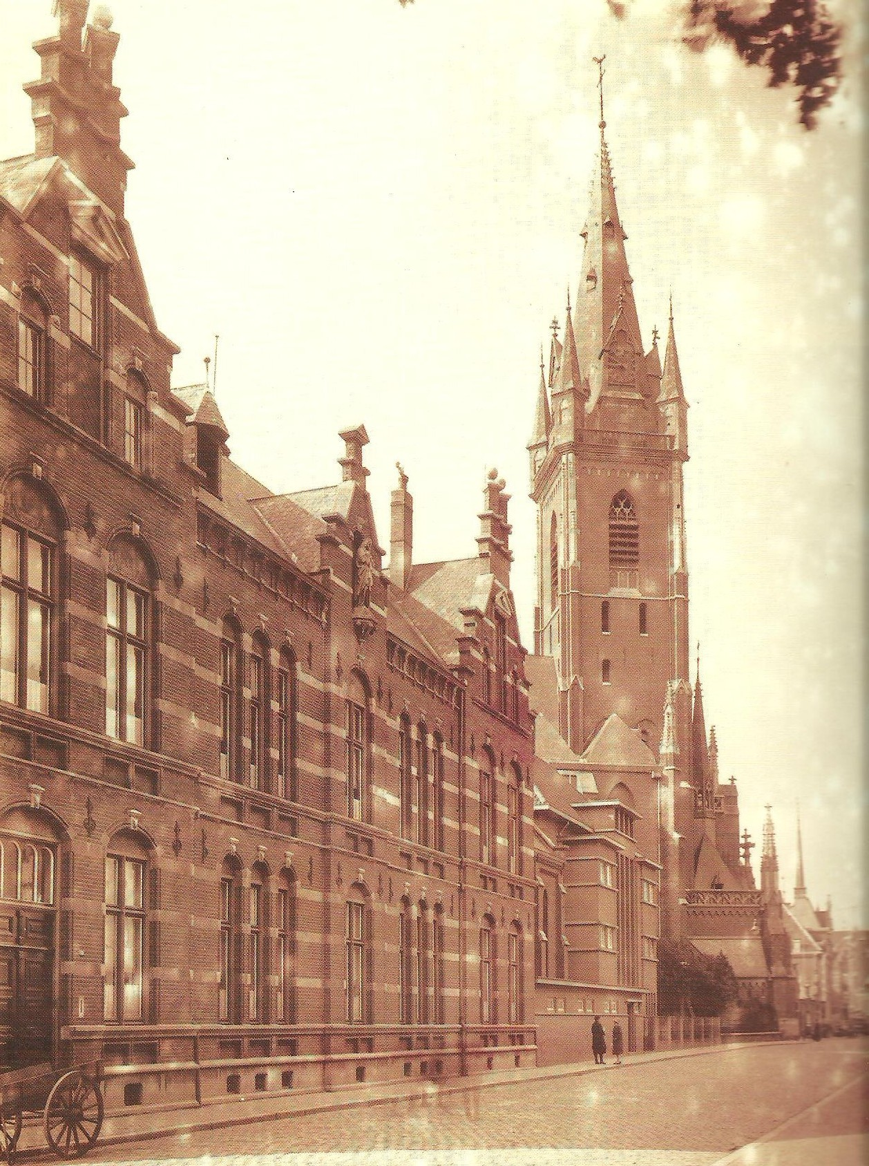 Grote Kerkstraat Venlo (1927). De toren uit 1879 naar ontwerp van Pierre Cuijpers